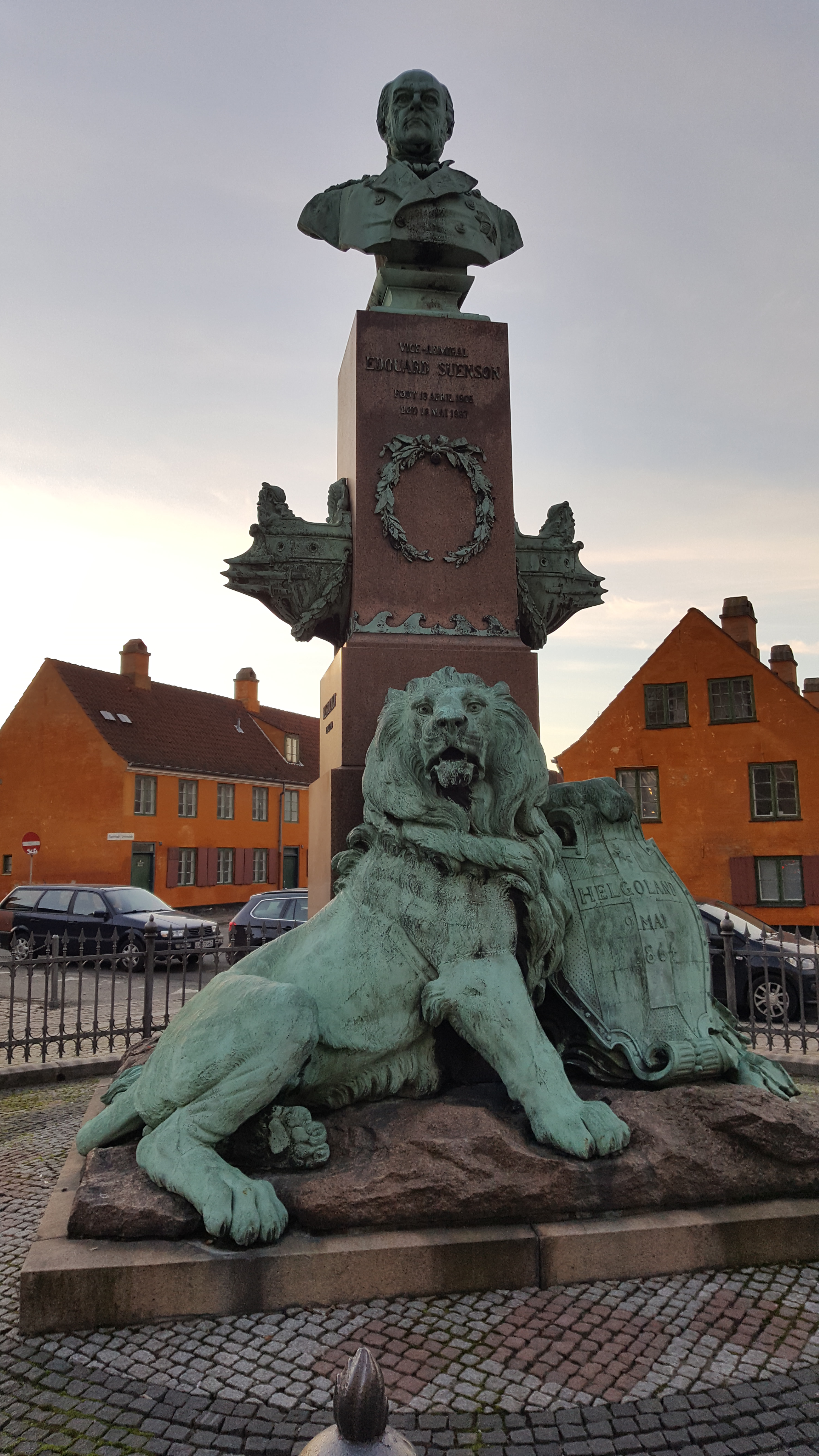 Monument der ærer Edouard Suenson for hans sejr under søslaget ved Helgoland i 1864 står ved Nyboder/Store Kongensgade i København